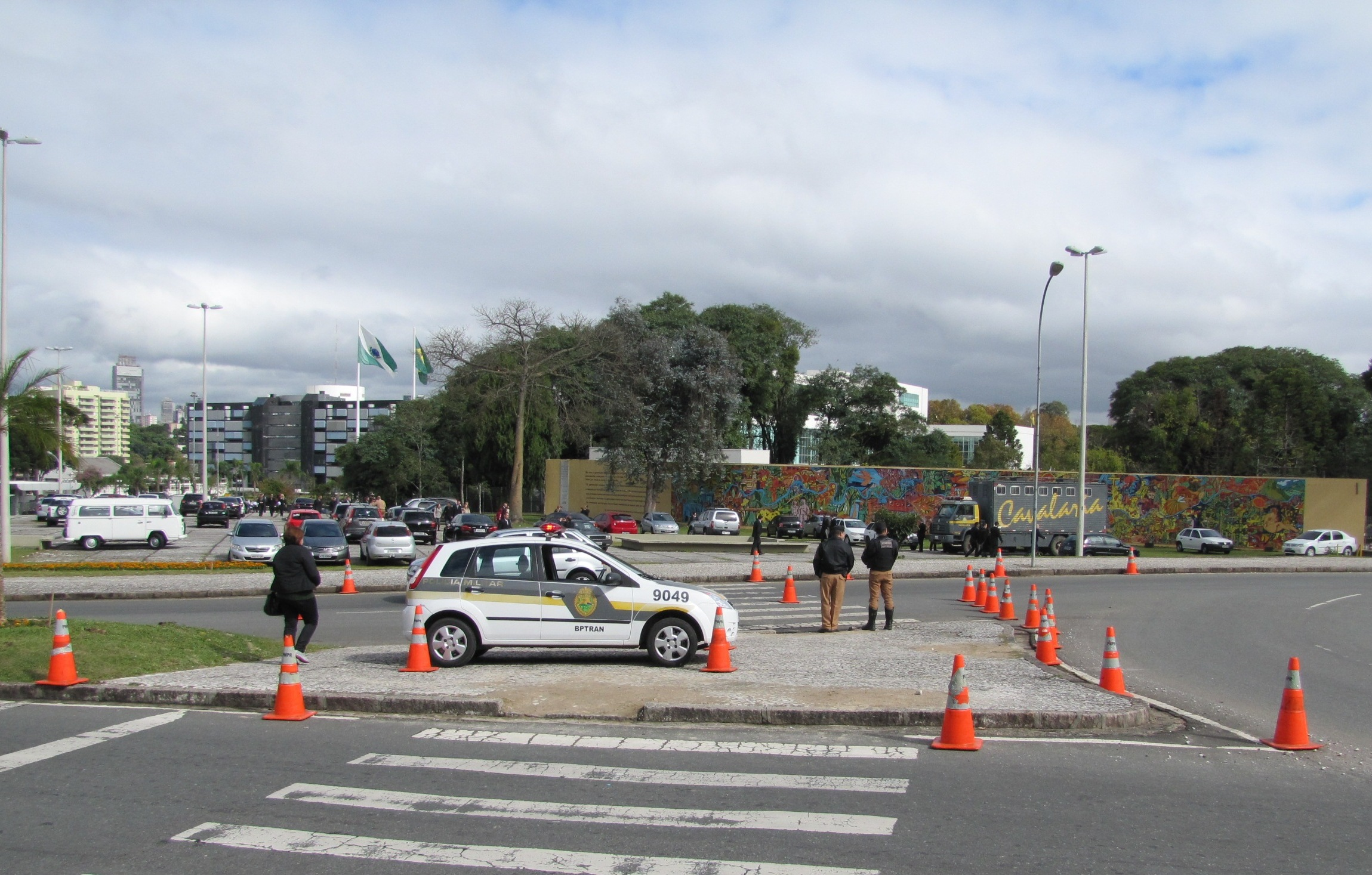 Policiamento de trânsito no Centro Cívico de Curitiba. Ao fundo: a Companhia Independente de Polícia de Guarda, o Palácio Iguaçu (semi-oculto pelas árvores) e o Palácio das Araucárias.